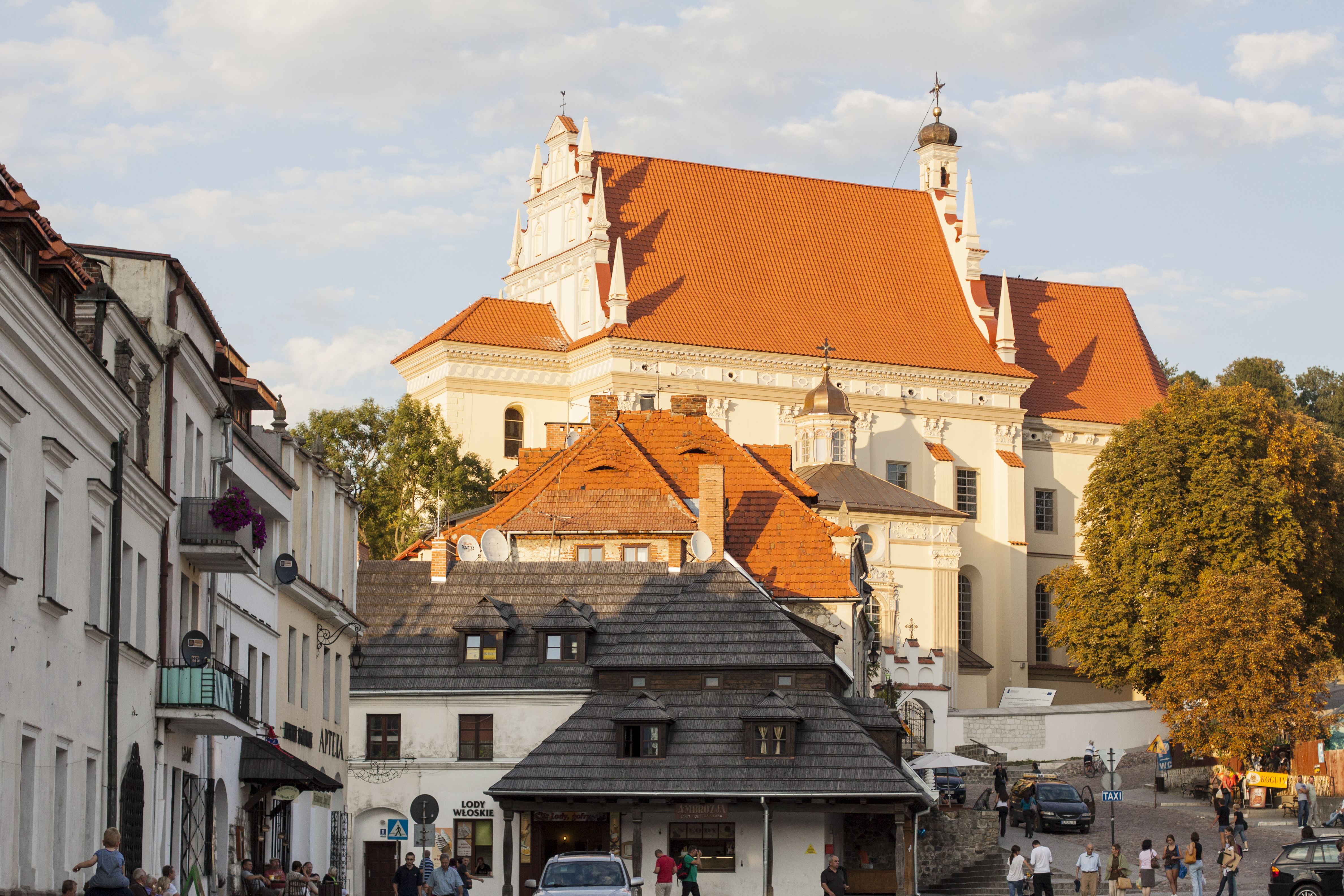 Kazimierz Dolny - zespół kościoła: kościół par. p.w. śś. Jana Chrzciciela i Bartłomieja